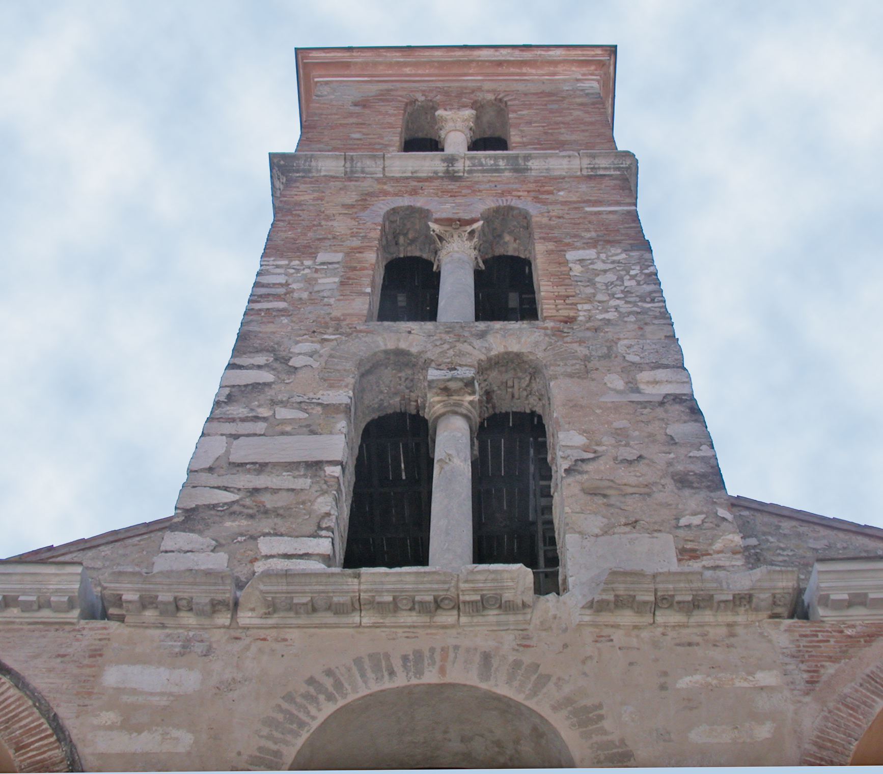 Italia, Minturno (città medioevale), campanile al centro della facciata del Duomo